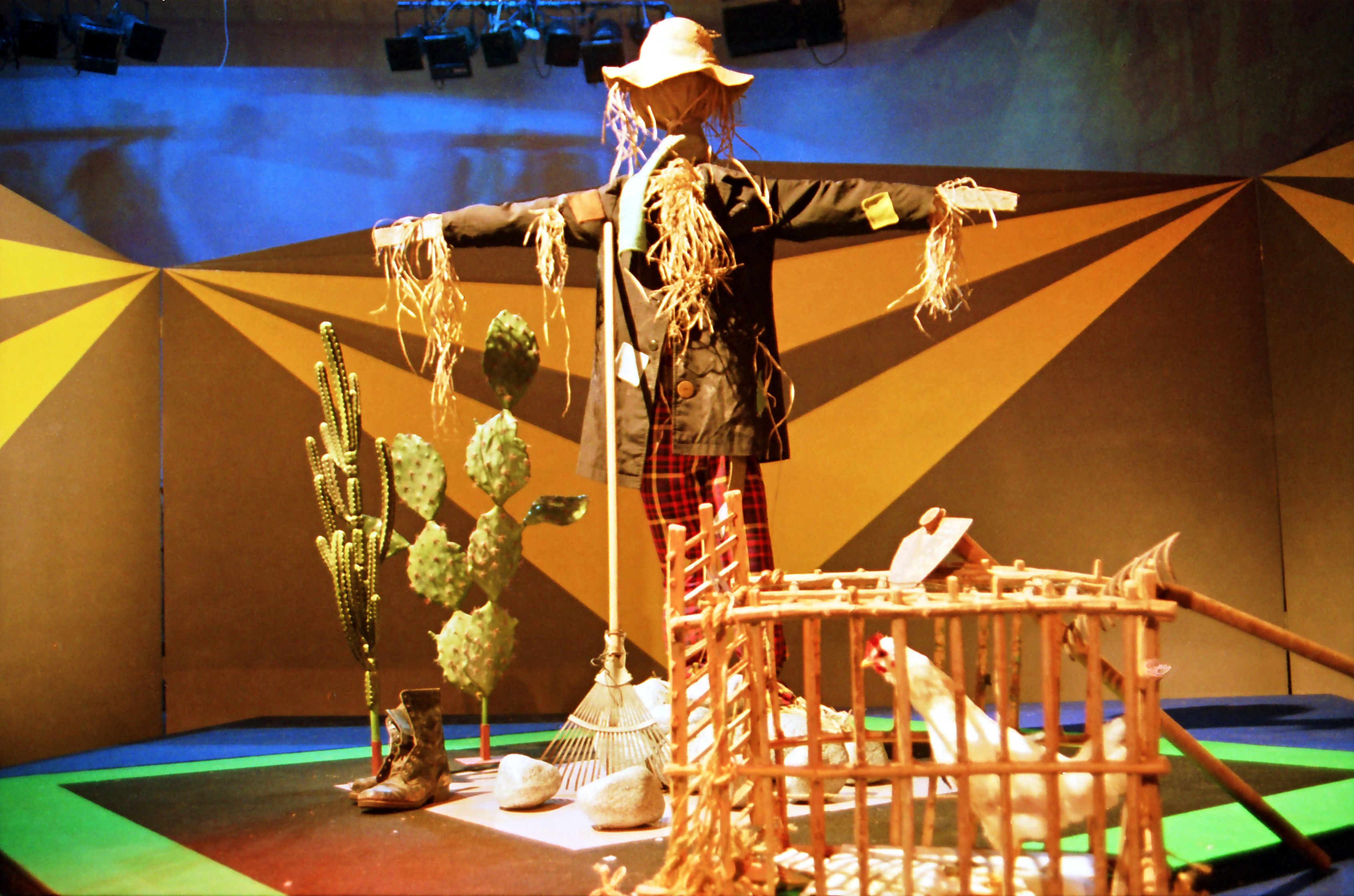 הדחליל שהמתין לאלו שלא זכו בפרסים